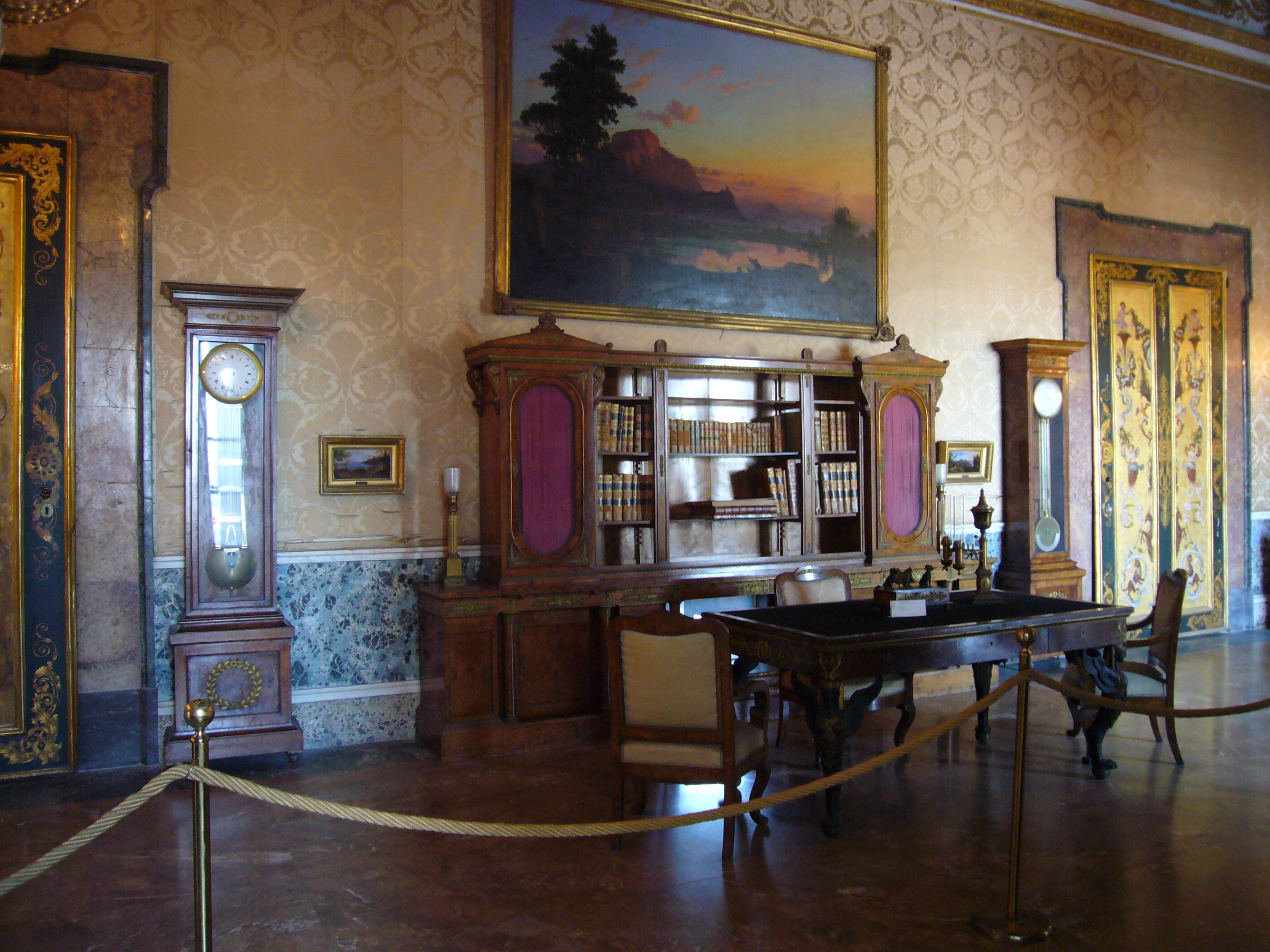 Napoli, Palazzo reale: lo studio del re (sala XIII). Mobilio francese di epoca murattiana portato da Parigi da Carolina Bonaparte